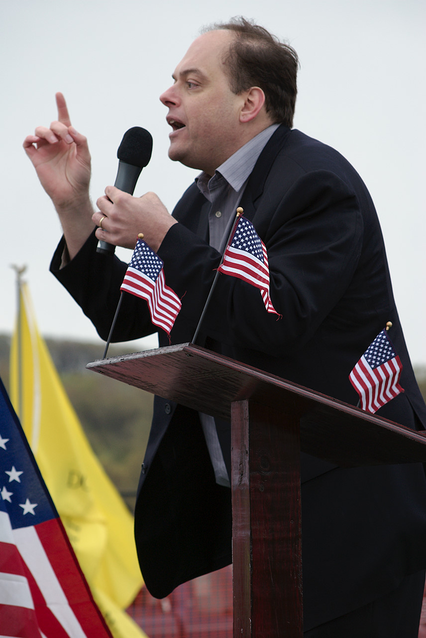 Jeff Kuhner speaking in 2010